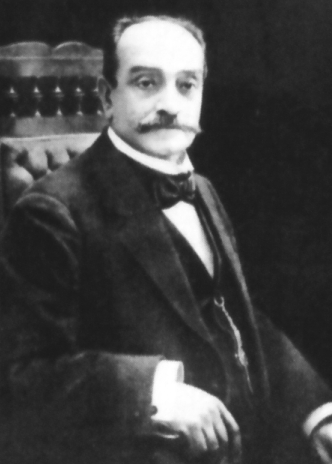 Constantino T. Carvallo (1853-1920) médico cirujano peruano, fundador de la cátedra de Ginecología en la UNMSM.